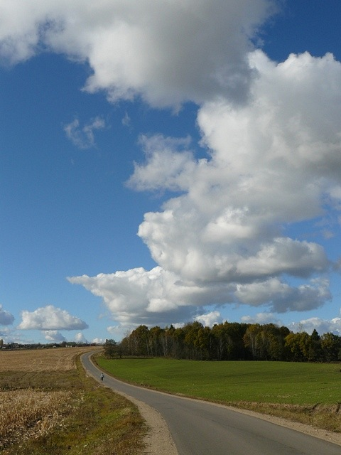 Пейзаж дороги между полем и лесом. Фото путешествия по Беларуси.